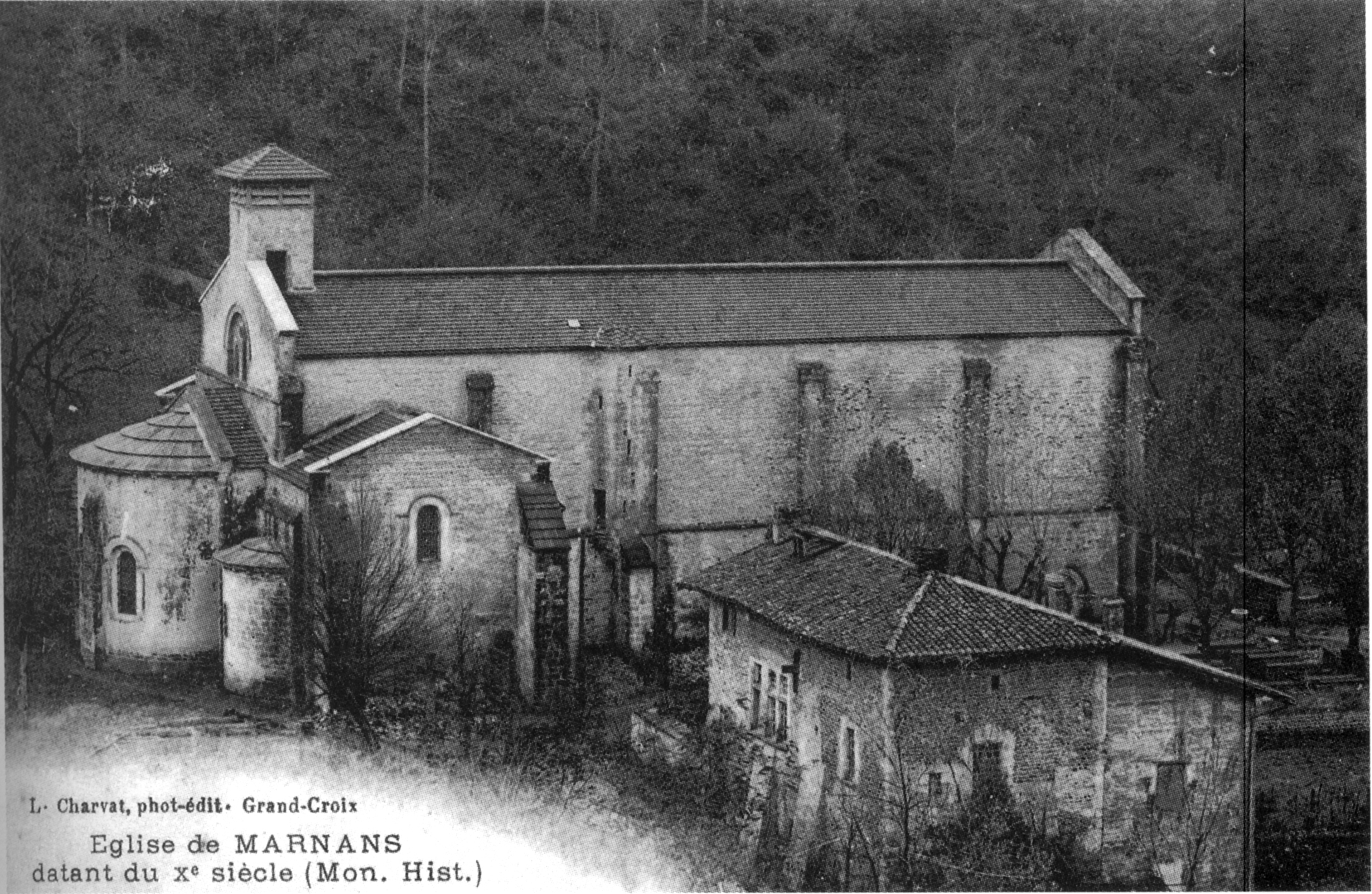 église de Marnans, MH datant du Xe siècle, en 1911